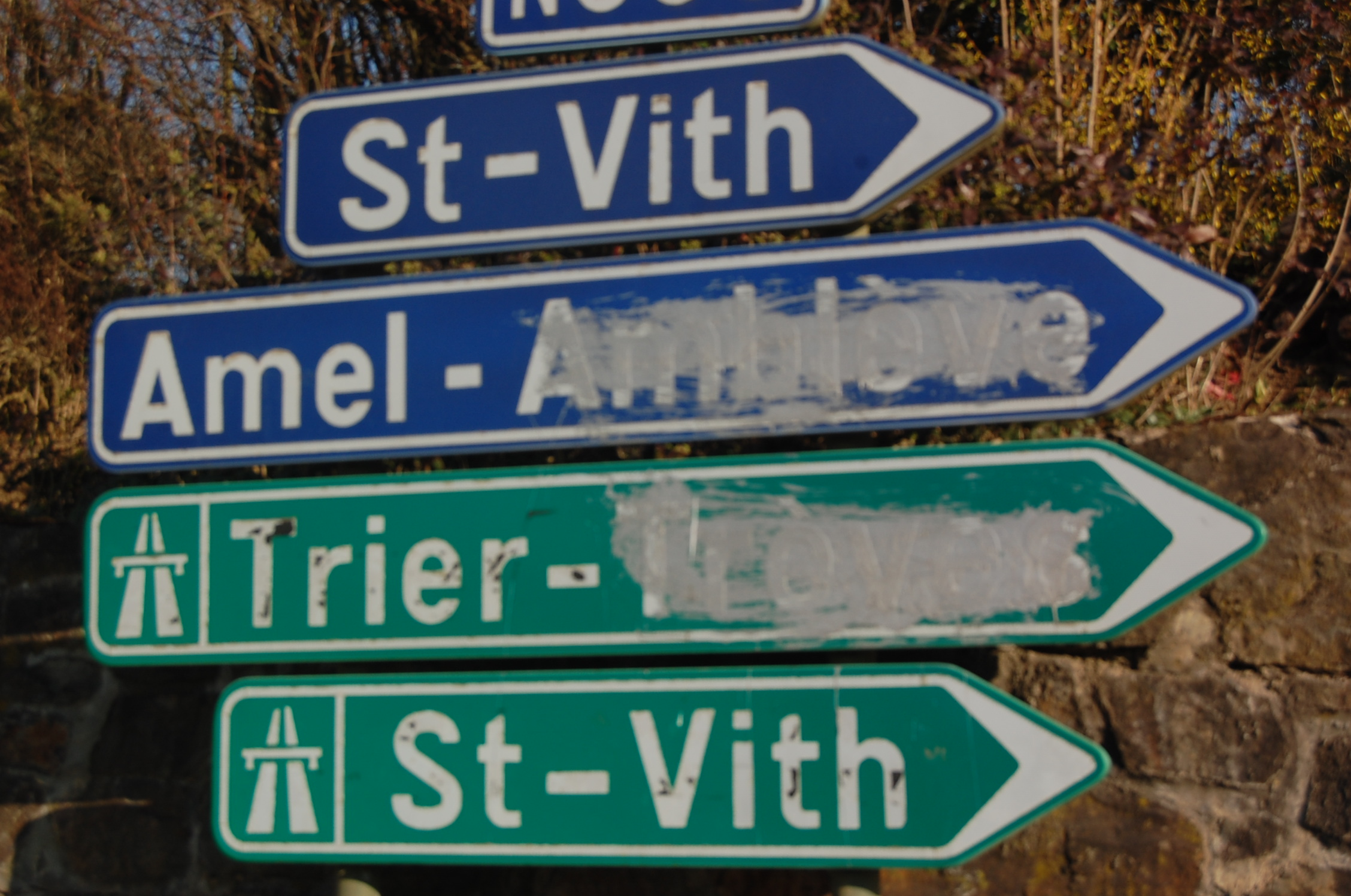 Walon: båraedje des nos e francès (Amblève, Trêves) so ene plake di voyes a Rete